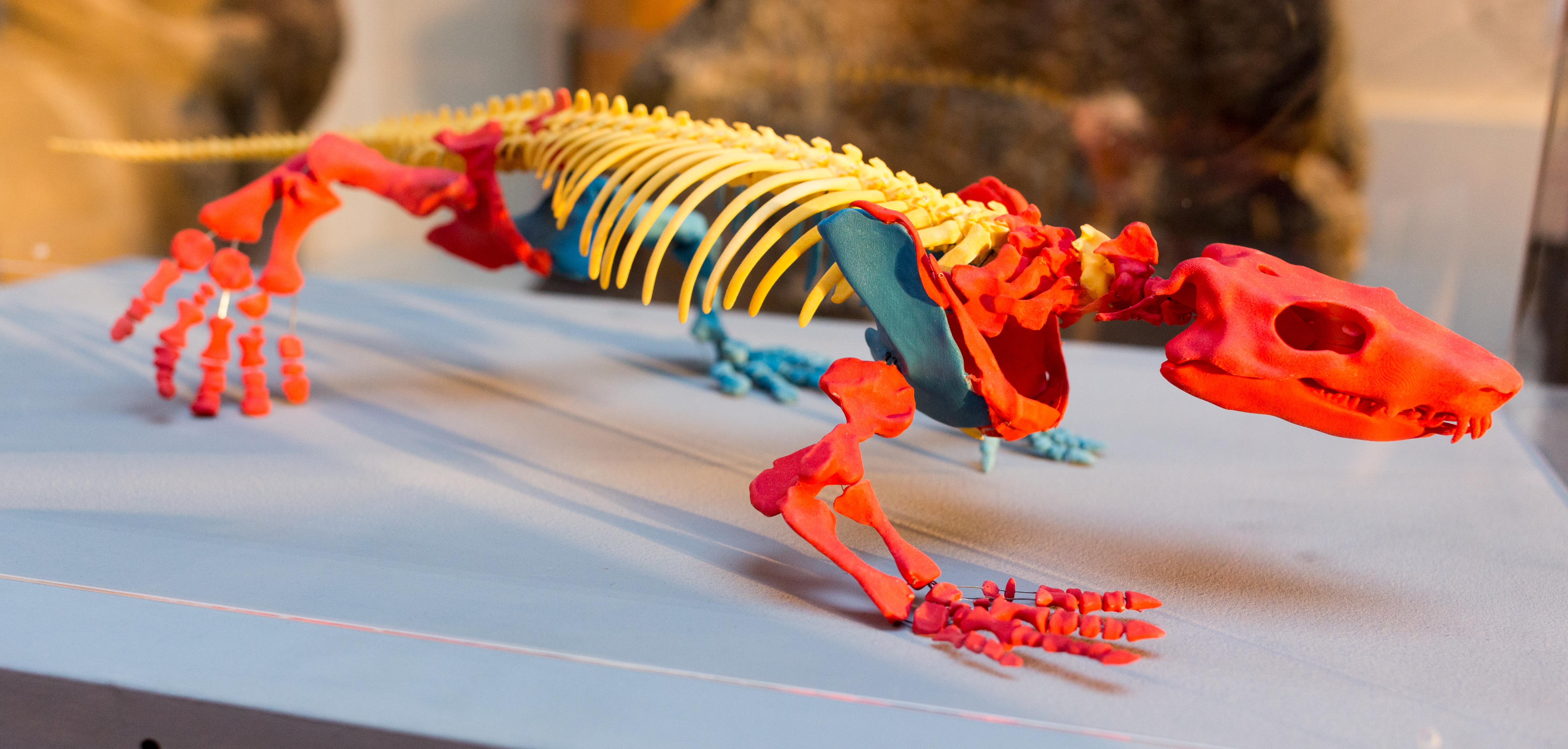 Orobates Pabsti; Humboldt Forum Highlights